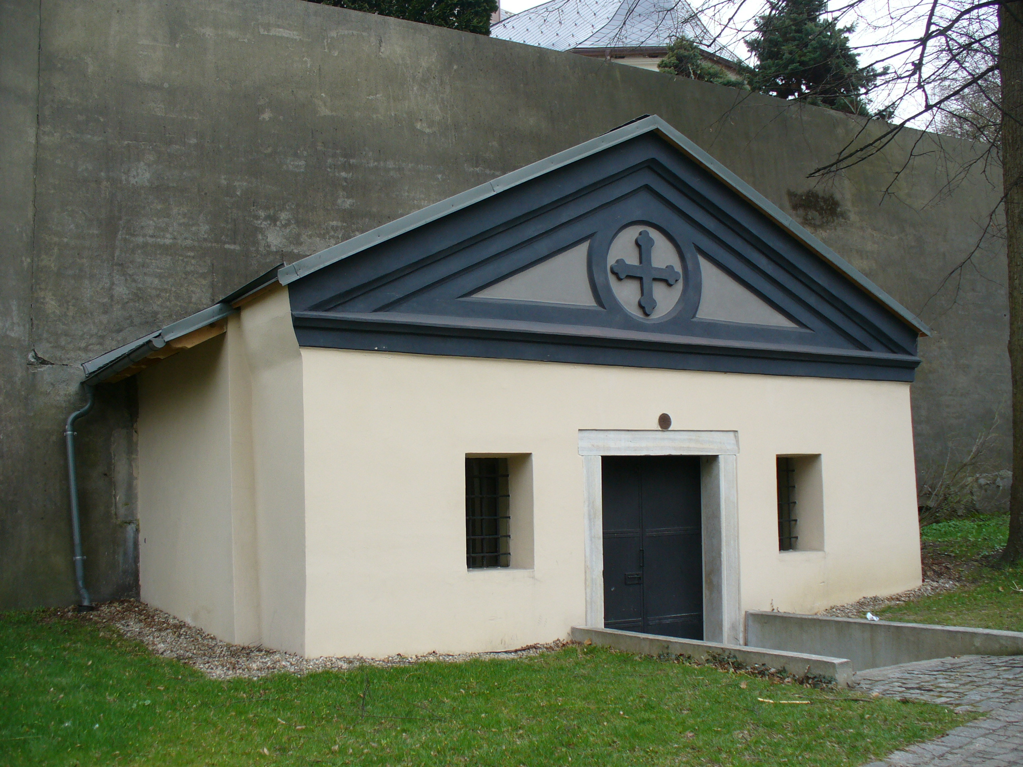 Rodinná hrobka Larischů-Mönnichů v Karviné-Fryštátě